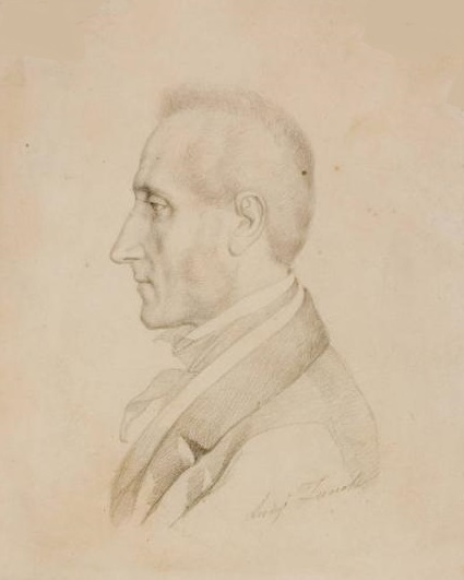 Alessandro Manzoni, matita su carta, 19.5 x 24 cm., firmato, Museo Manzoniano, Lecco